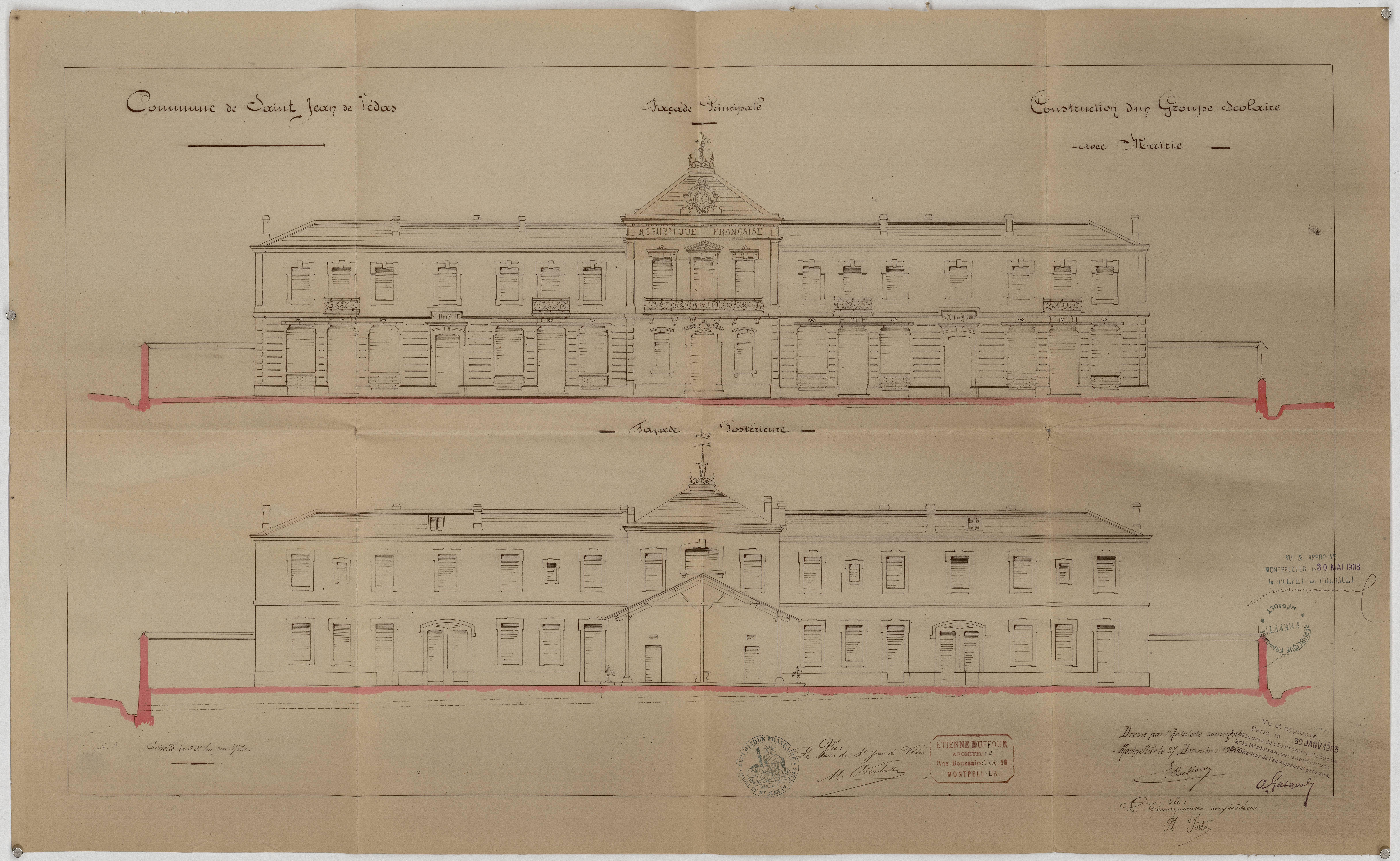 Saint-Jean-de-Védas. - Projet de construction d'un groupe scolaire avec mairie : élévations de la façade principale et de la façade postérieure.